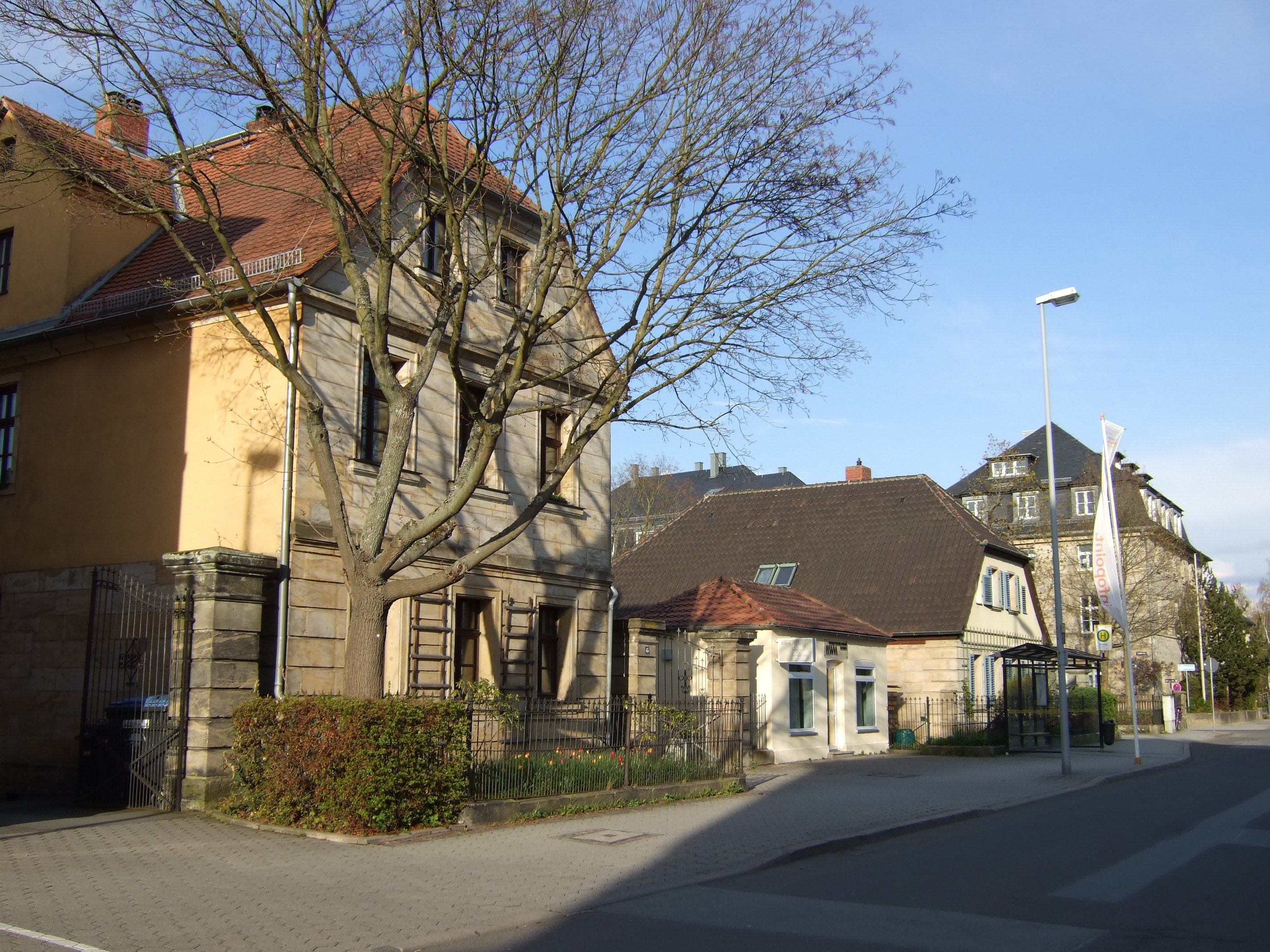 Obere Richard-Wagner-Straße Bayreuth